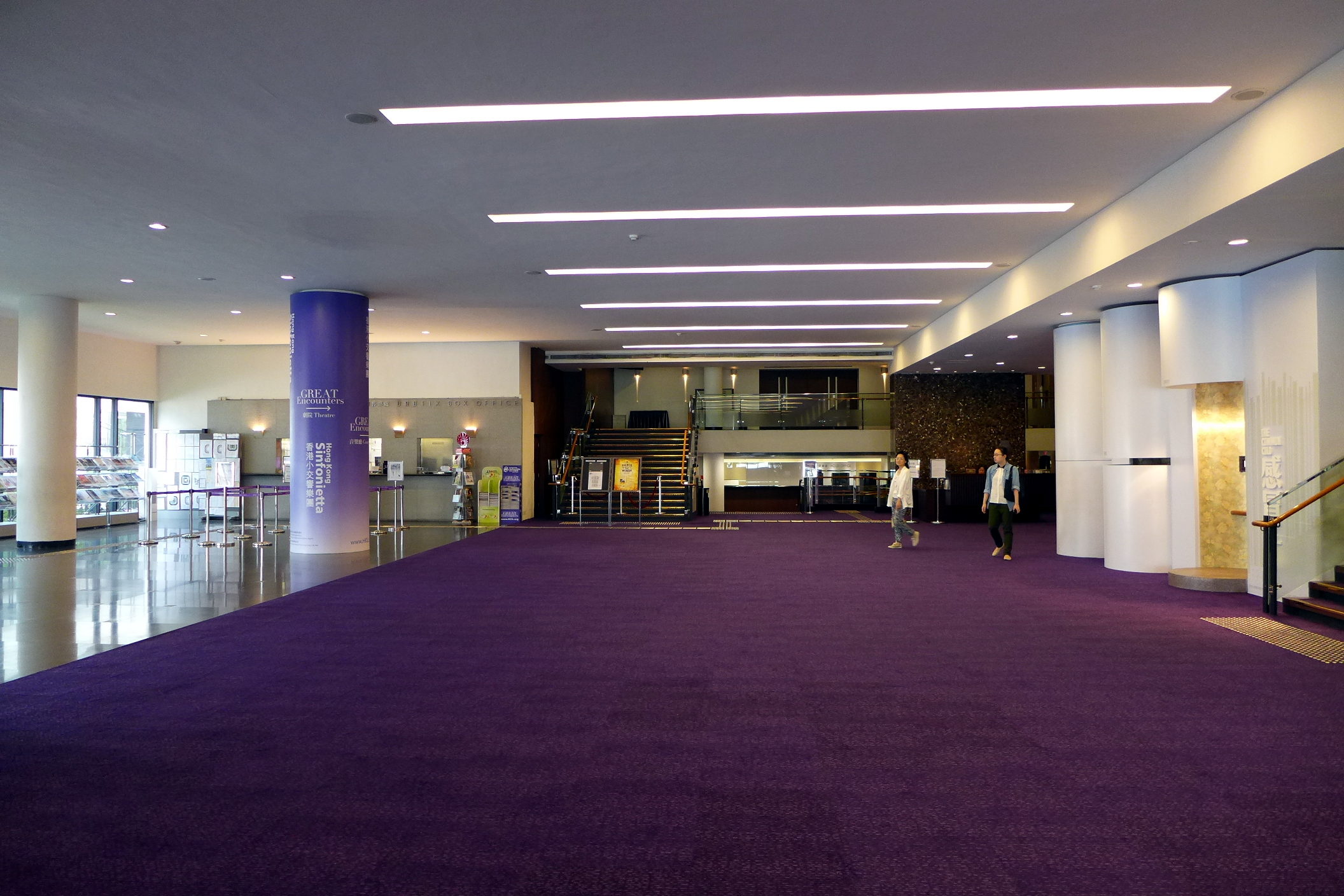 Hong Kong City Hall Lobby